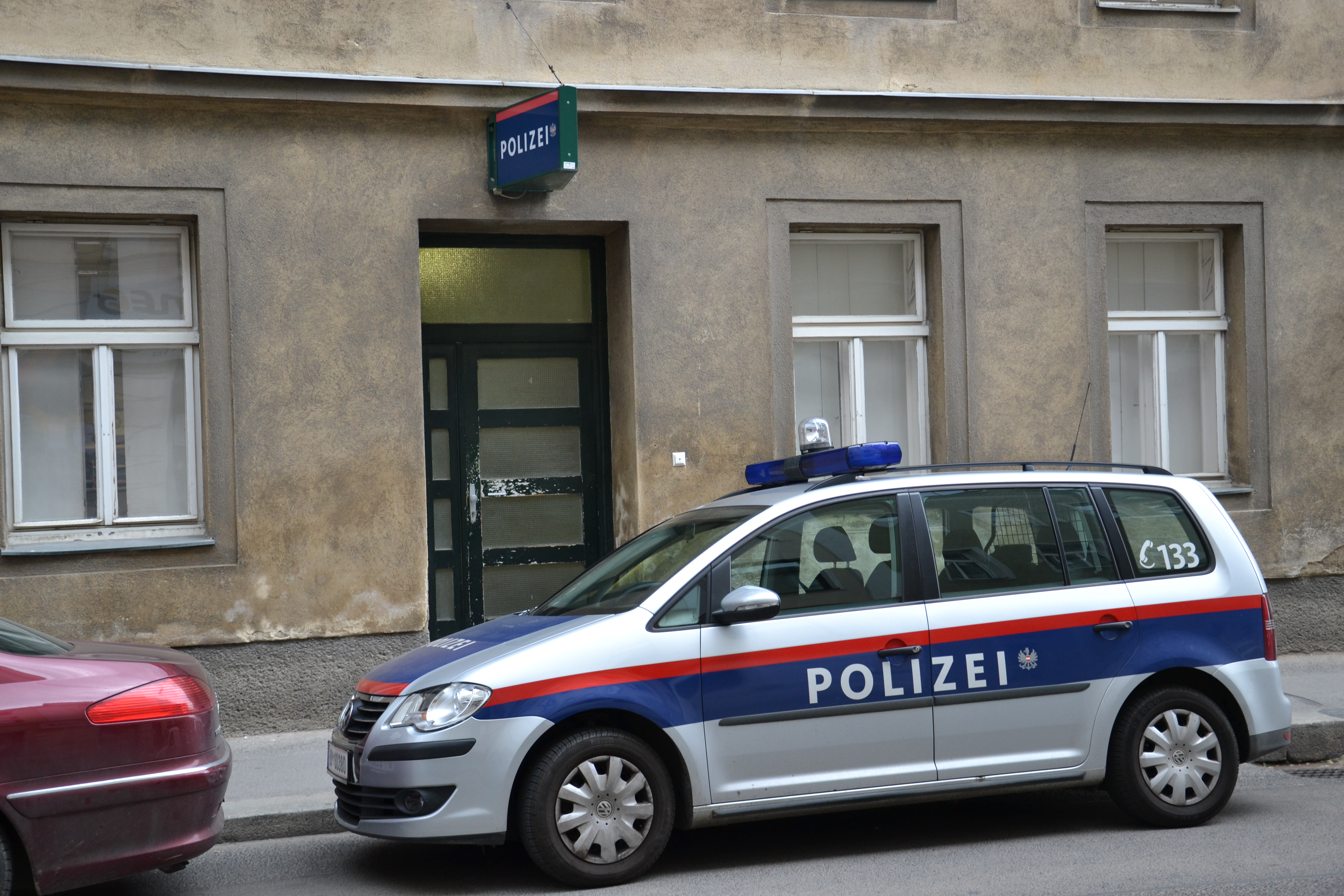 Polizeiinspektion Keplergasse Keplergasse 10 1100 Wien